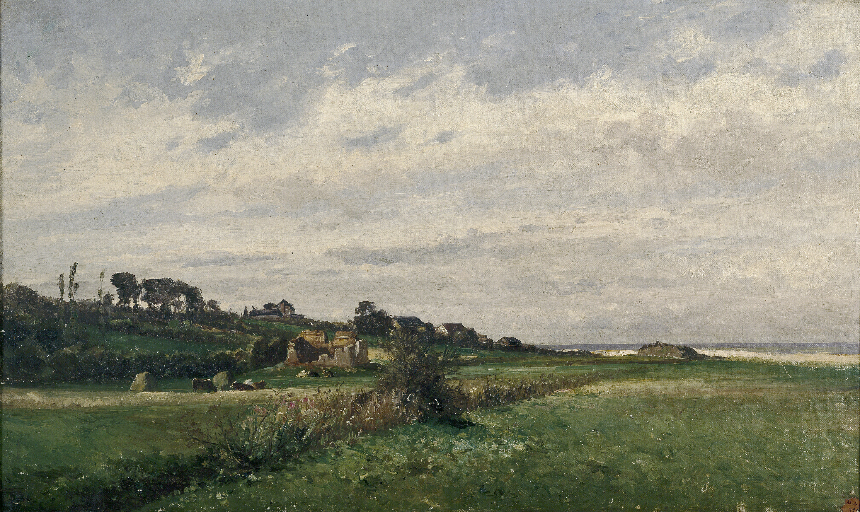 De izquierda a derecha, se abre un camino en cuyo borde crecen matorrales floridos. Sobre la ladera, se observa un núcleo rural y al fondo y en declive hacia la derecha, ruinas de caserío entre árboles al borde del camino. Cielo con nubes muy turbulentas. Al fondo y marcando la línea del horizonte se adivina una playa con olas rompientes (Gutiérrez Márquez, A., Carlos de Haes en el Museo del Prado 1826-1898, Madrid, 2002).